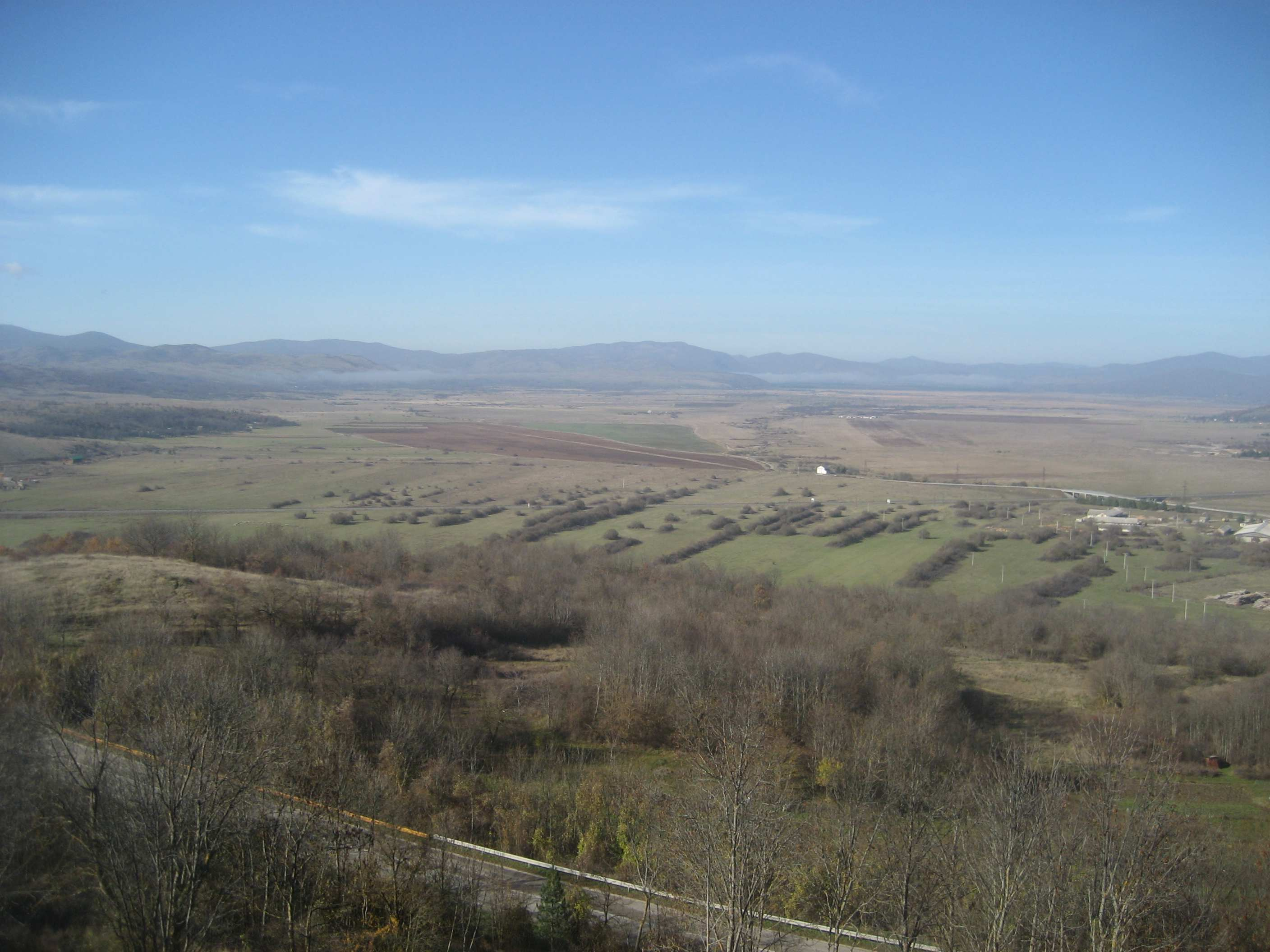 Pogled na Krbavsko polje, ispred Crkve hrvatskih mučenika na Udbini